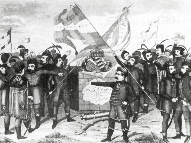 Magyarország és Erdély egyesülésének allegóriája. Tyroler József metszete (1848)